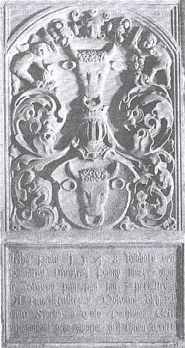 Nahrobek Jan IV. z Pernštejna